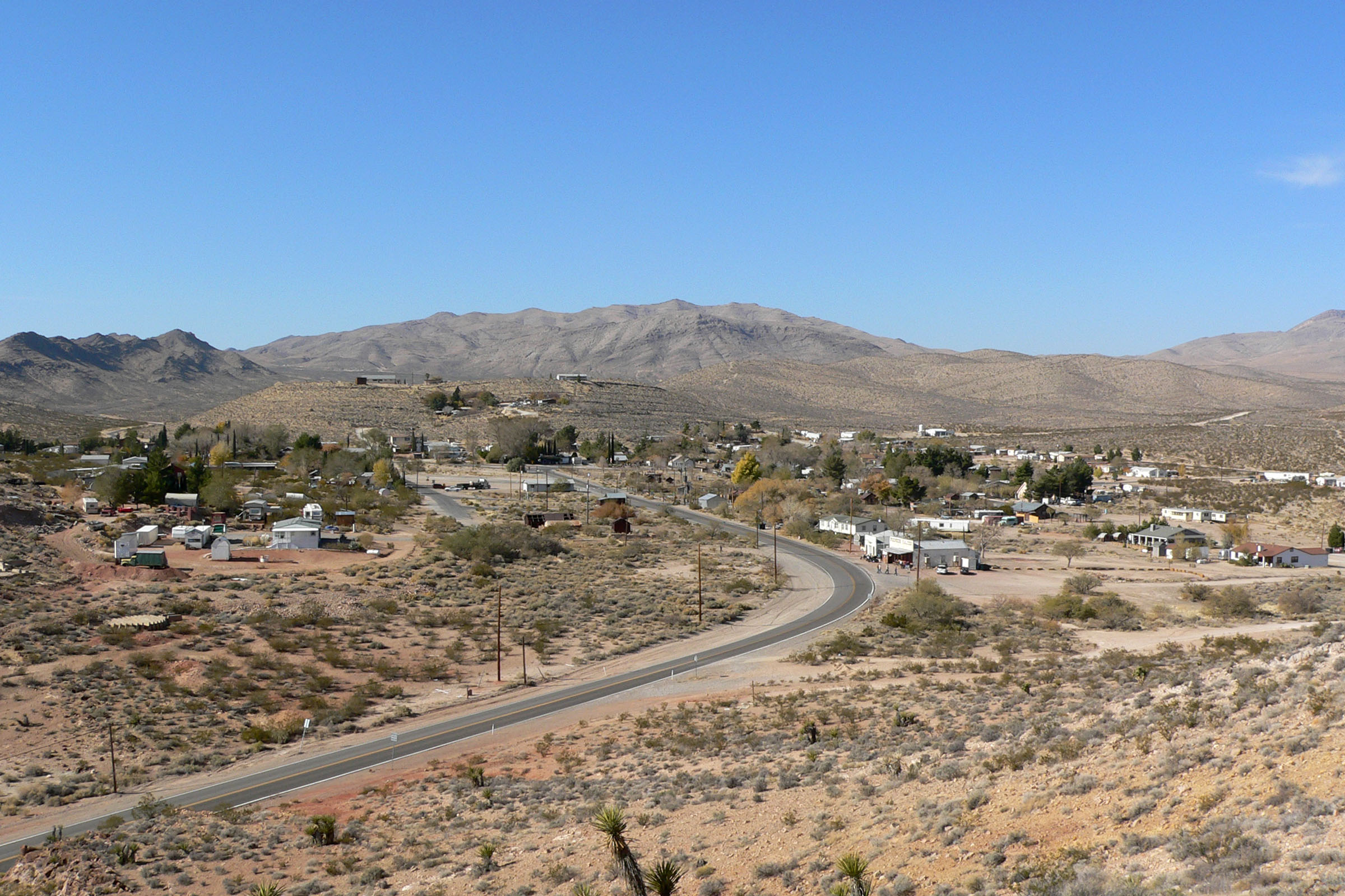 General view of Goodsprings, Nevada